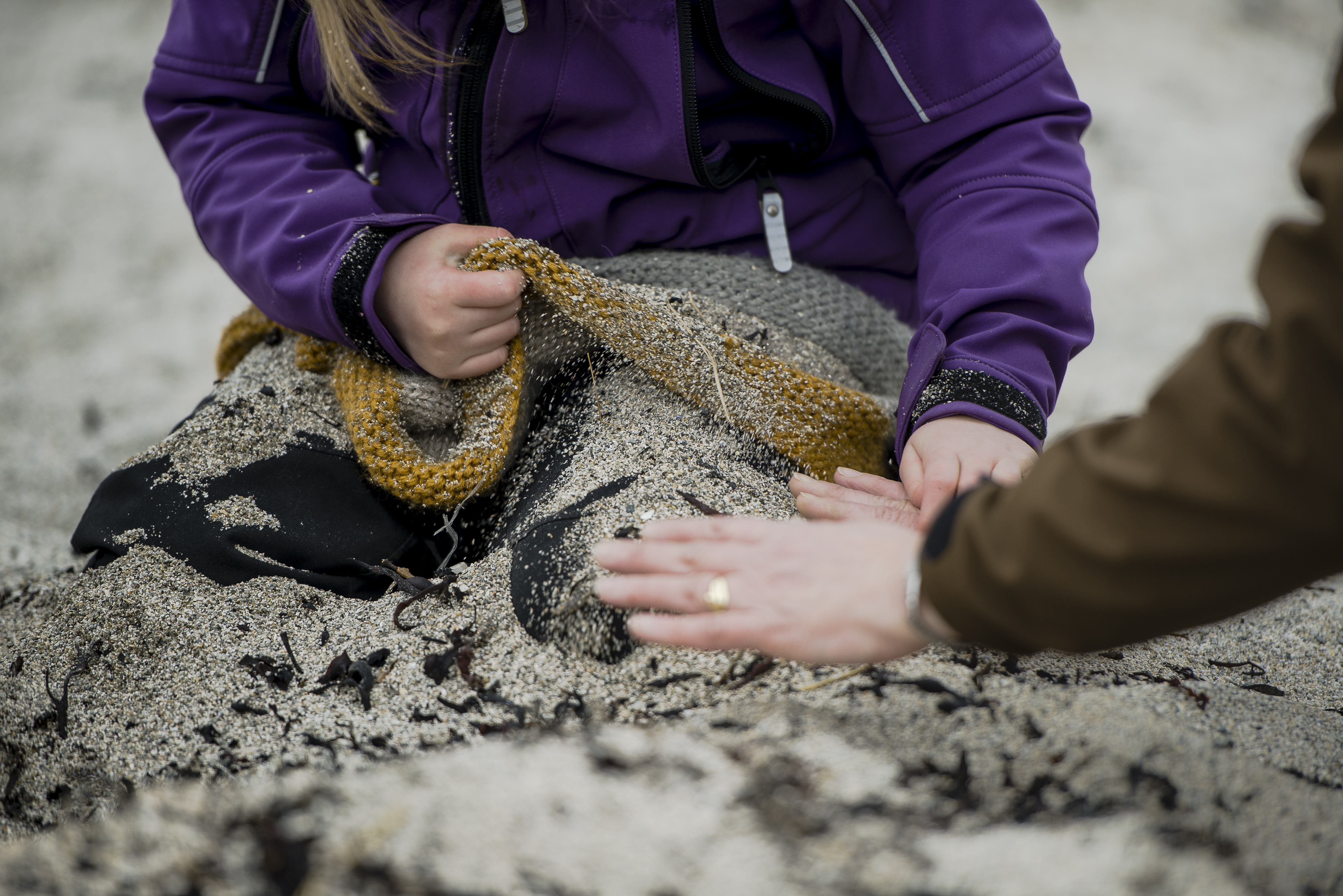 Barn og voksen, hender i sand.